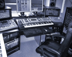 Vengeance-Studios von Manuel Schleis